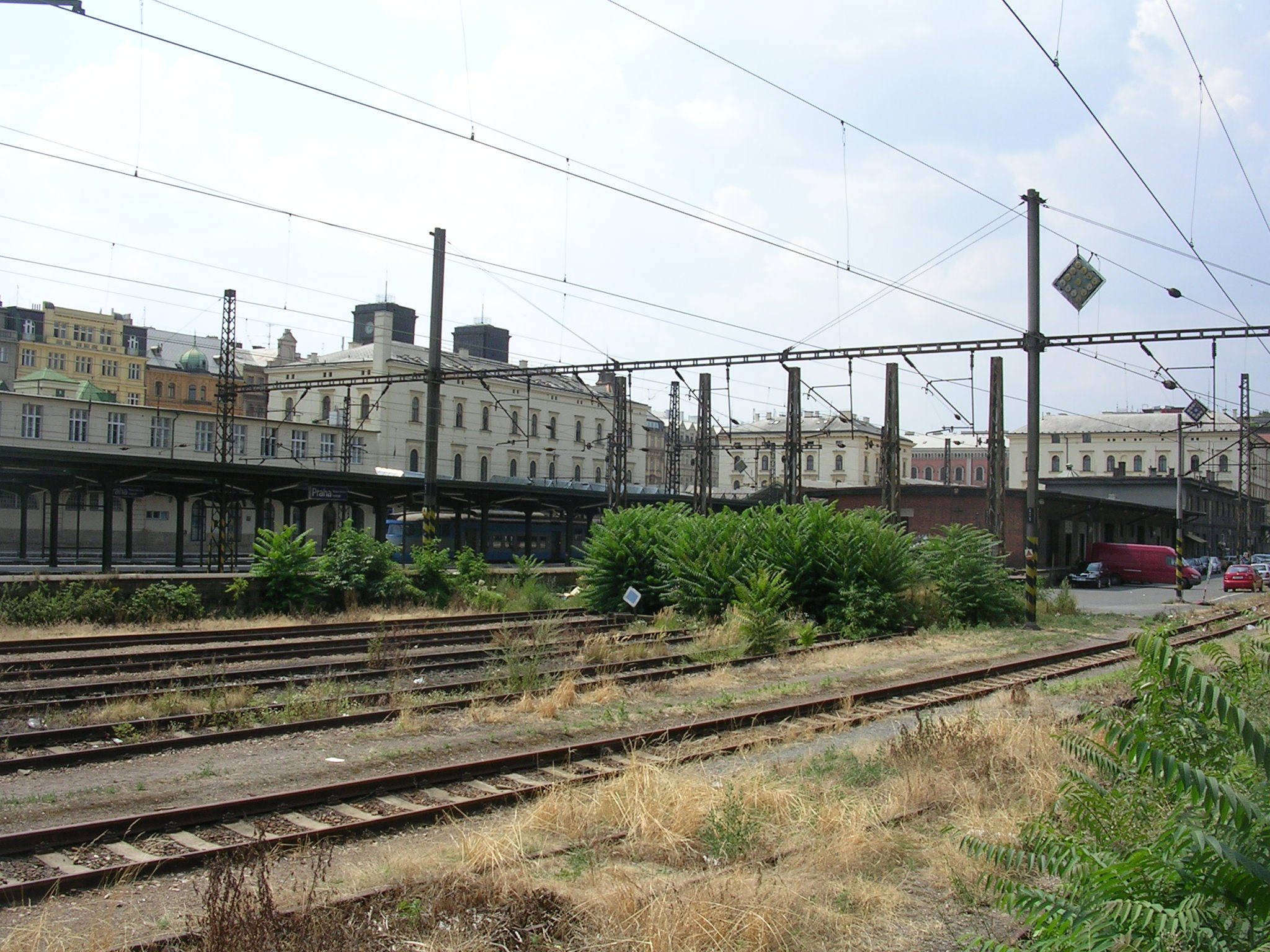 Masarykovo nádraží v pohledu od ulice Na Florenci.